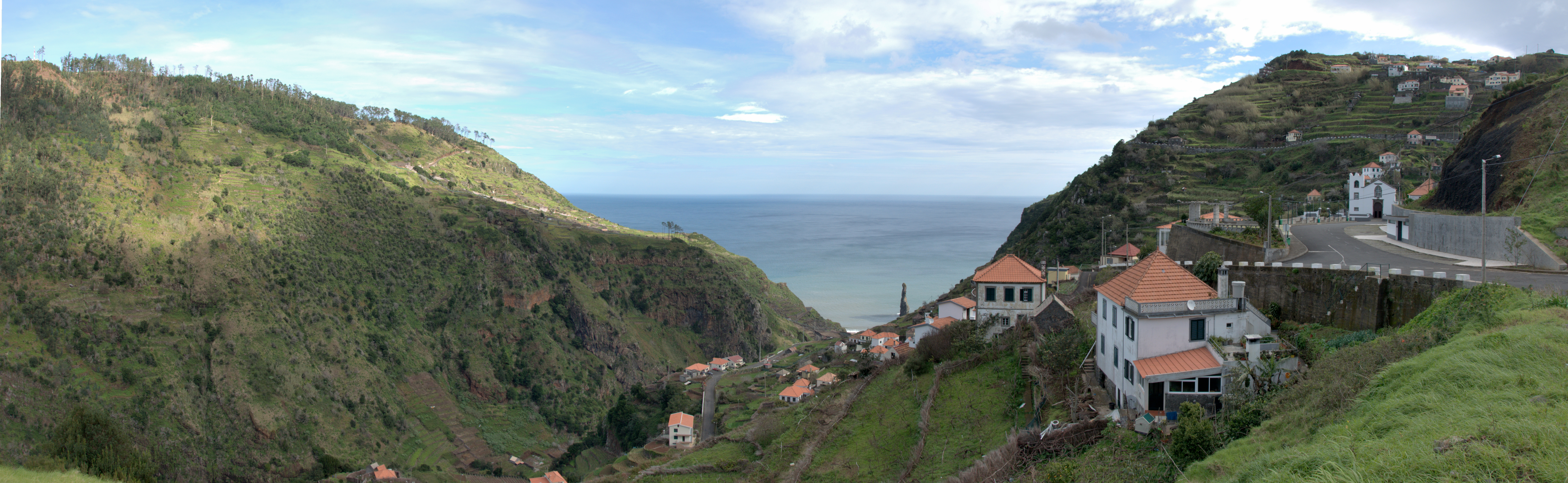 Portugal, Ribeira da Janela